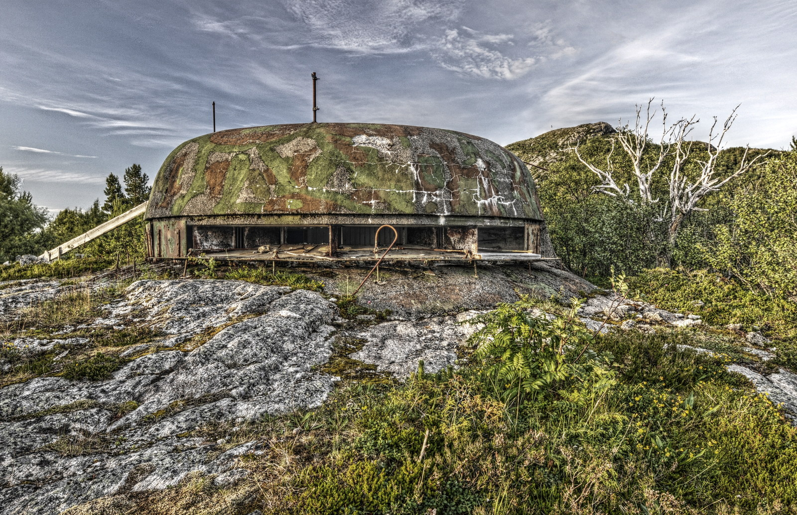 ved Brettingen fort